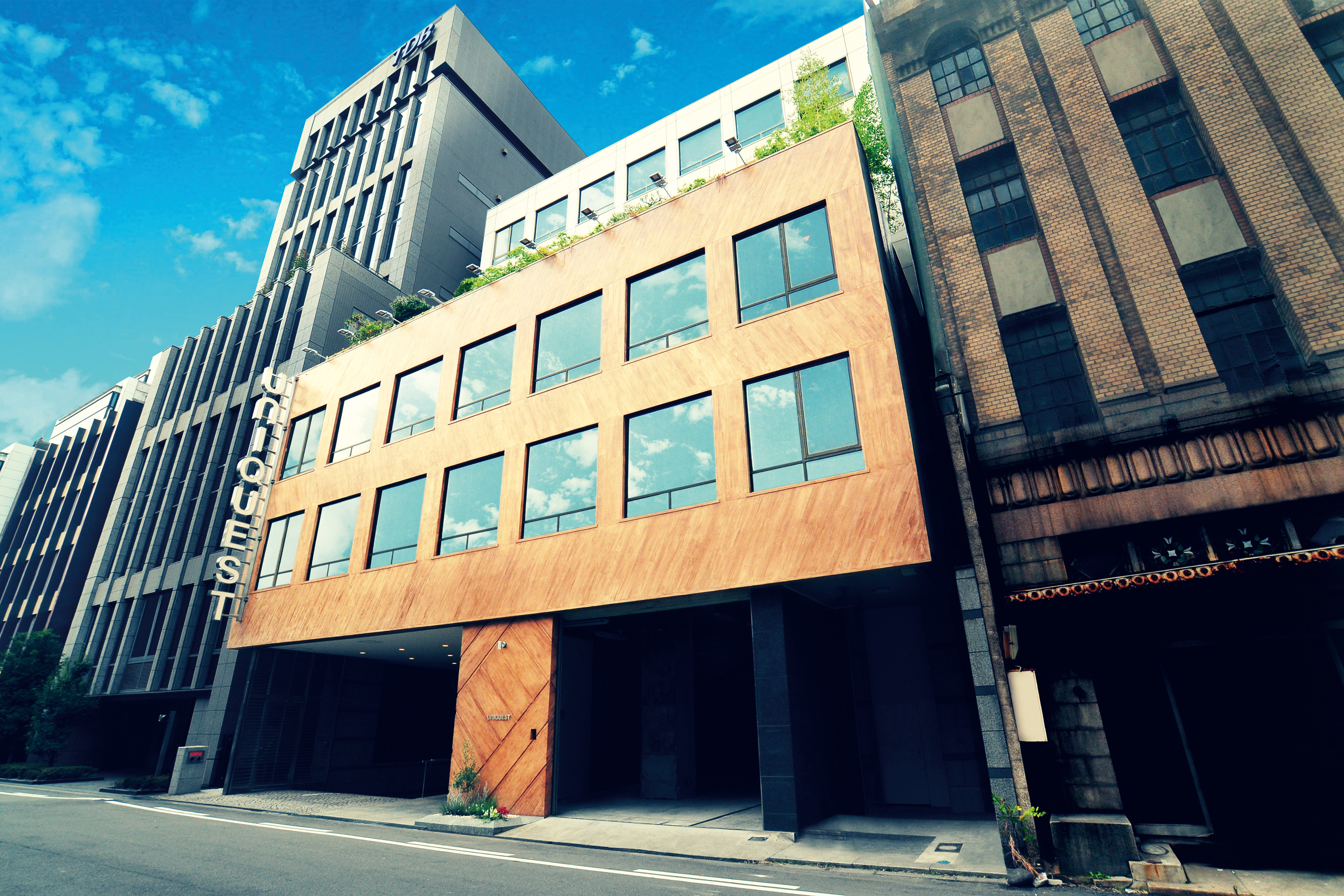 株式会社ユニクエスト